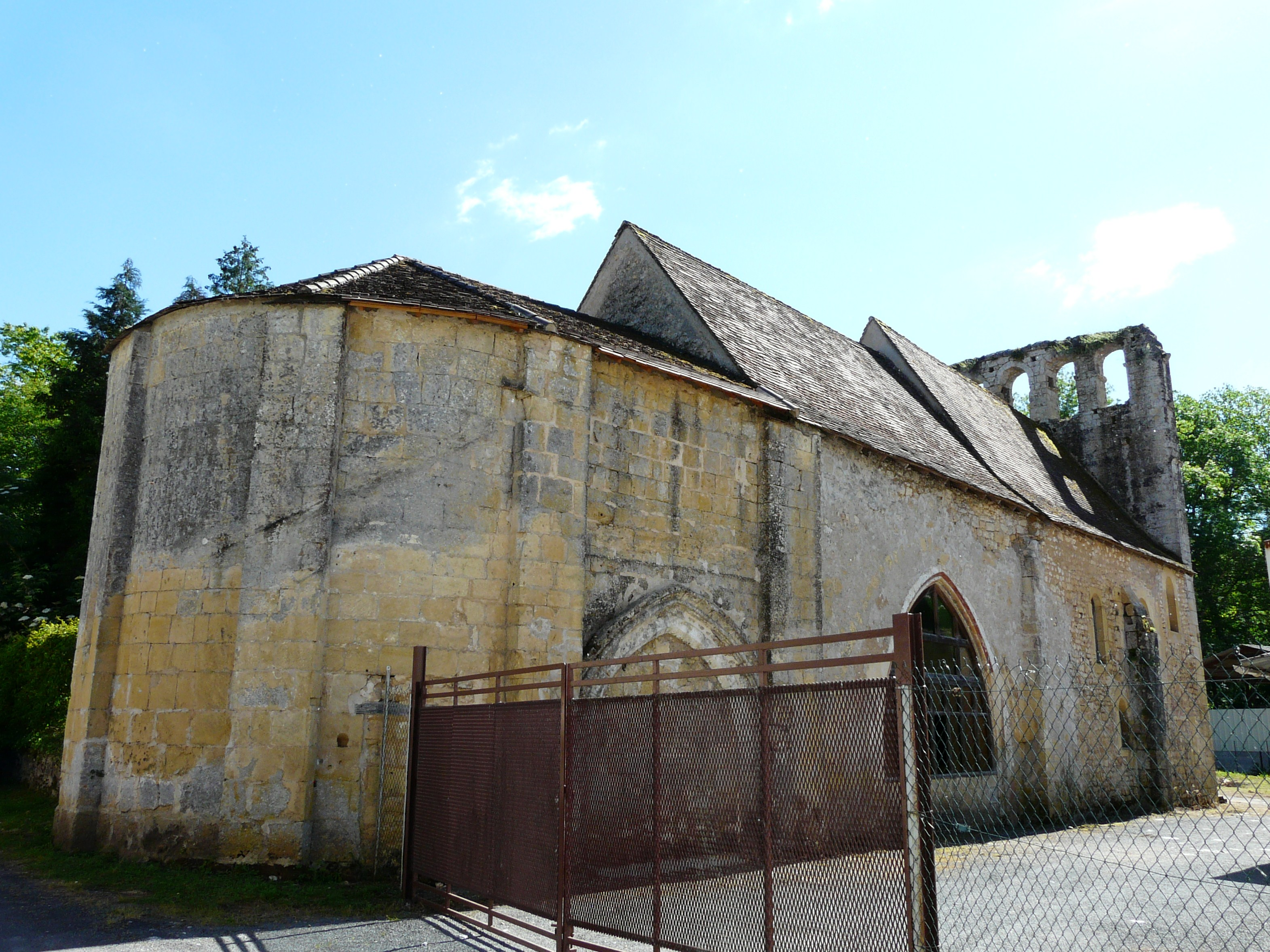 Le chevet de l'église Saint-Pierre, Couze-et-Saint-Front, Dordogne, France.